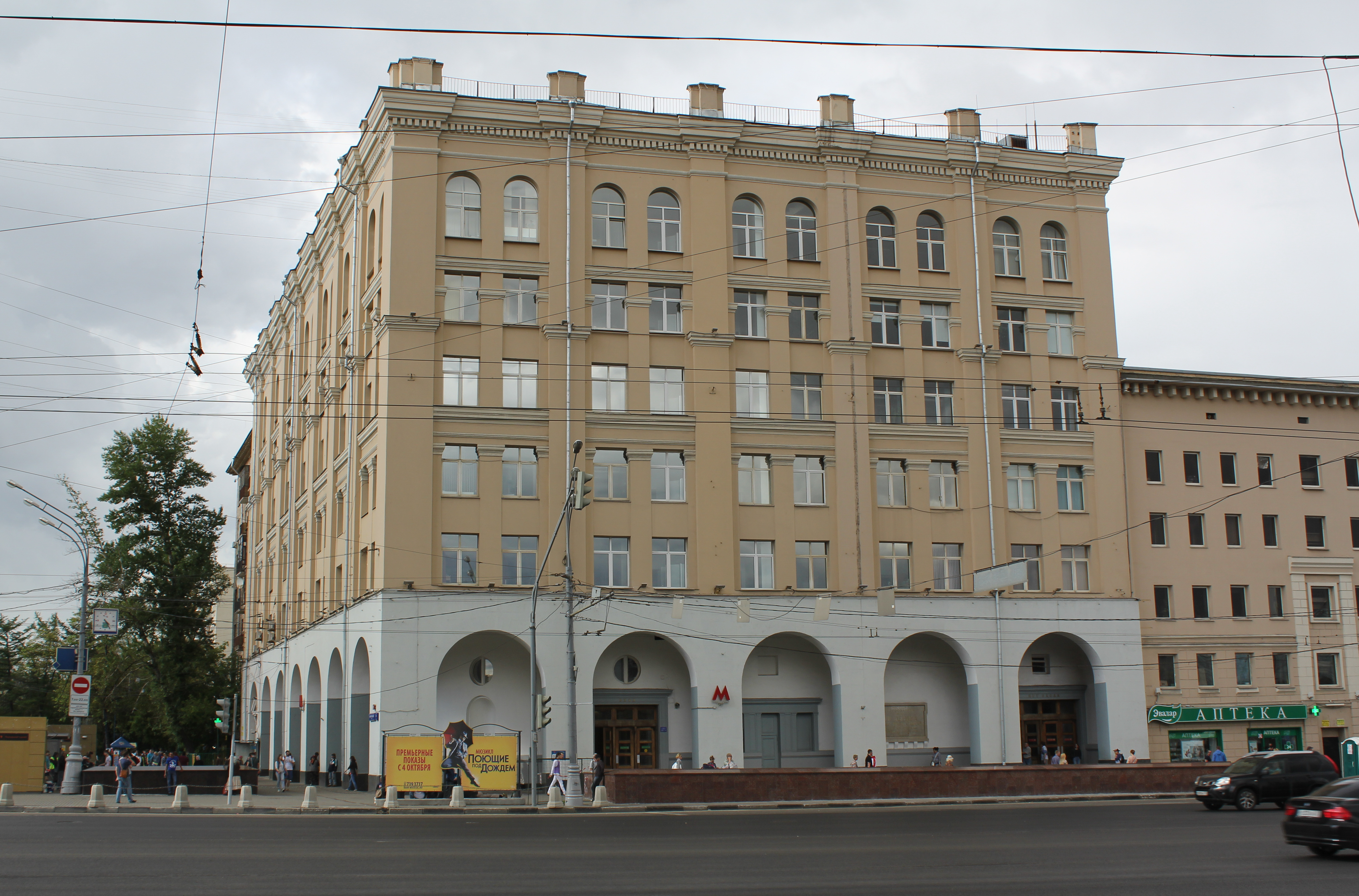 Северный вестибюль станции метро Павелецкая-радиальная